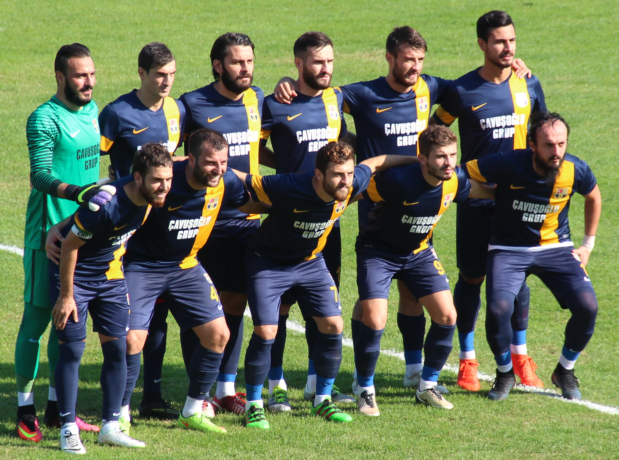 Derincespor 53 - İlker Günay, 3 - Deniz Durmuş, 41 - Zafer Doğan, 61 - Emre Kaba, 95 - Abdülkadir Kaba, 8 - Samet Gül, 14 - Aykut Köz, 37 - Ahmet Güney, 73 - Raif Gündoğdu, 1 - Murat Aydın, 10 - İbrahim Gürel